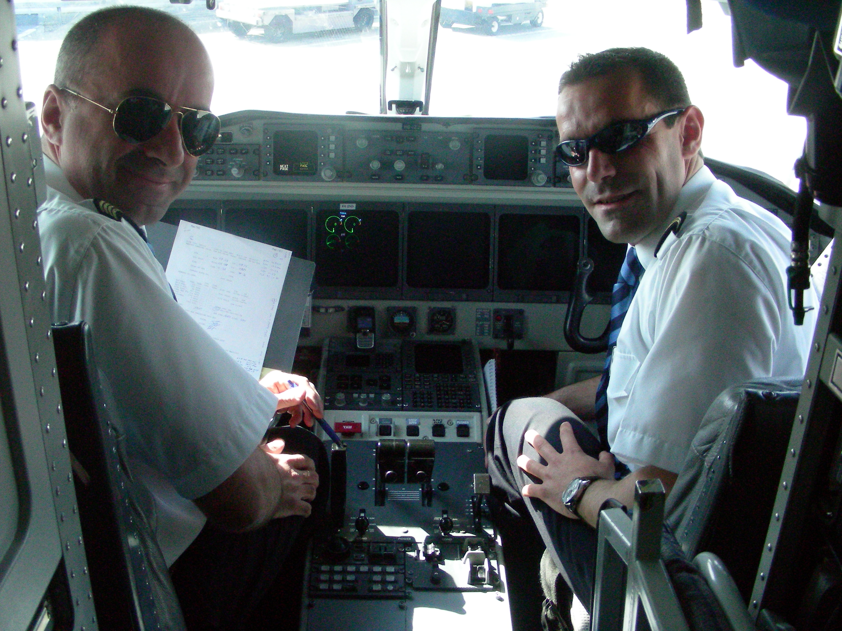 Cockpit Saab 2000